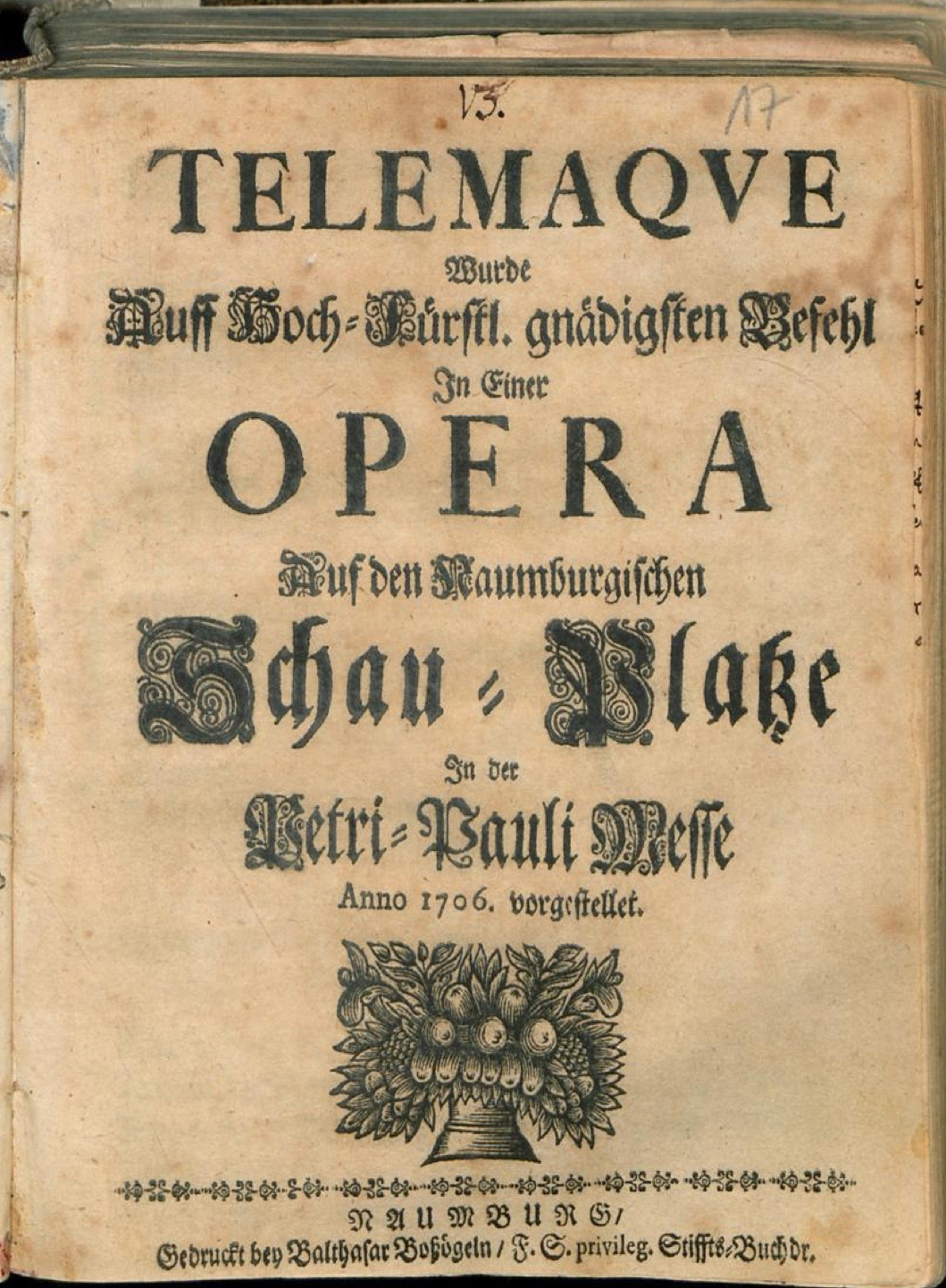 Titelblatt des Librettos der Oper "Telemaque" Naumburg 1706 von Johann Christoph Frauendorff Musik: Georg Caspar Schürmann